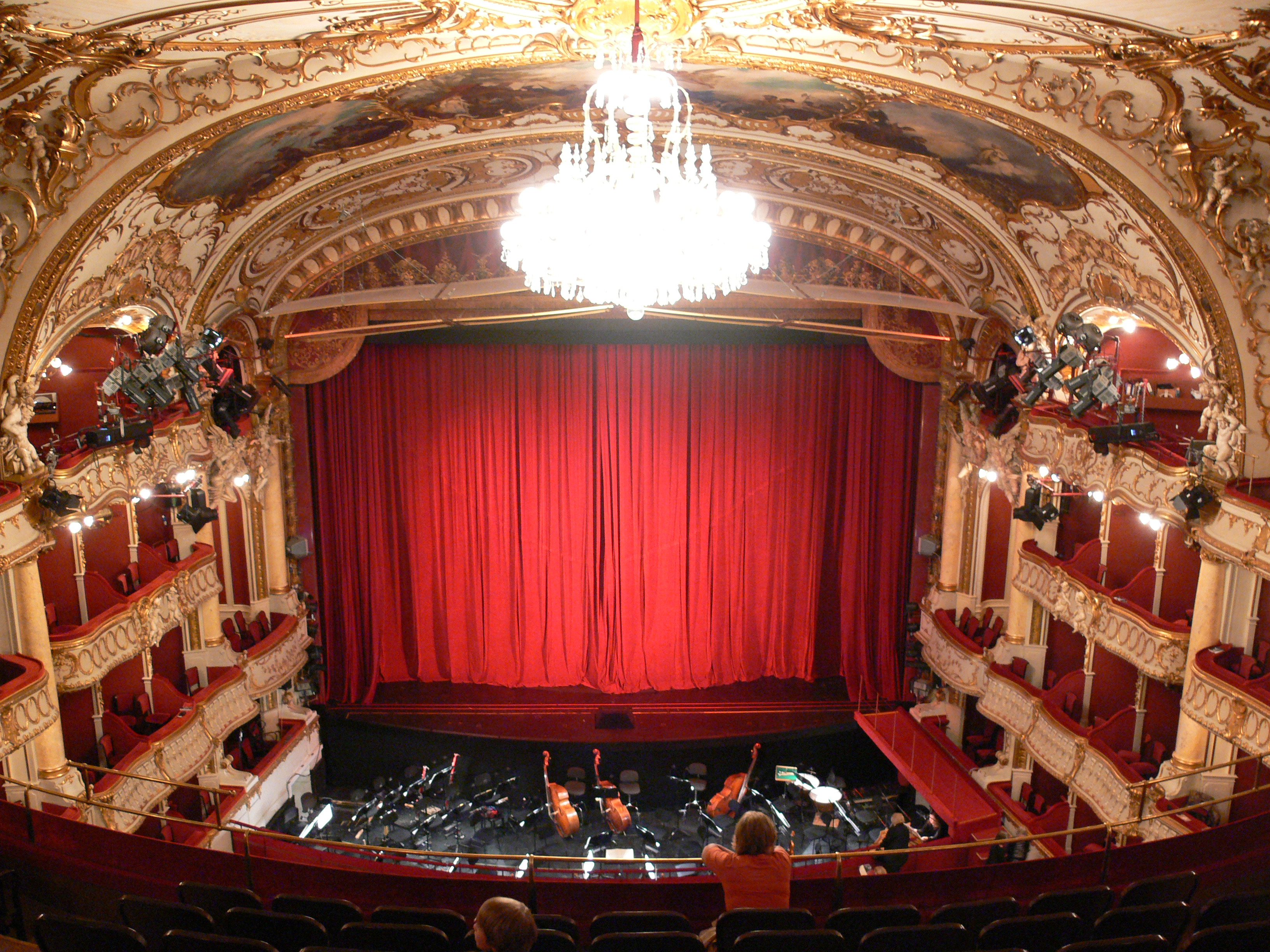 Opernhaus Graz Zuschauerraum, Blick zur Bühne